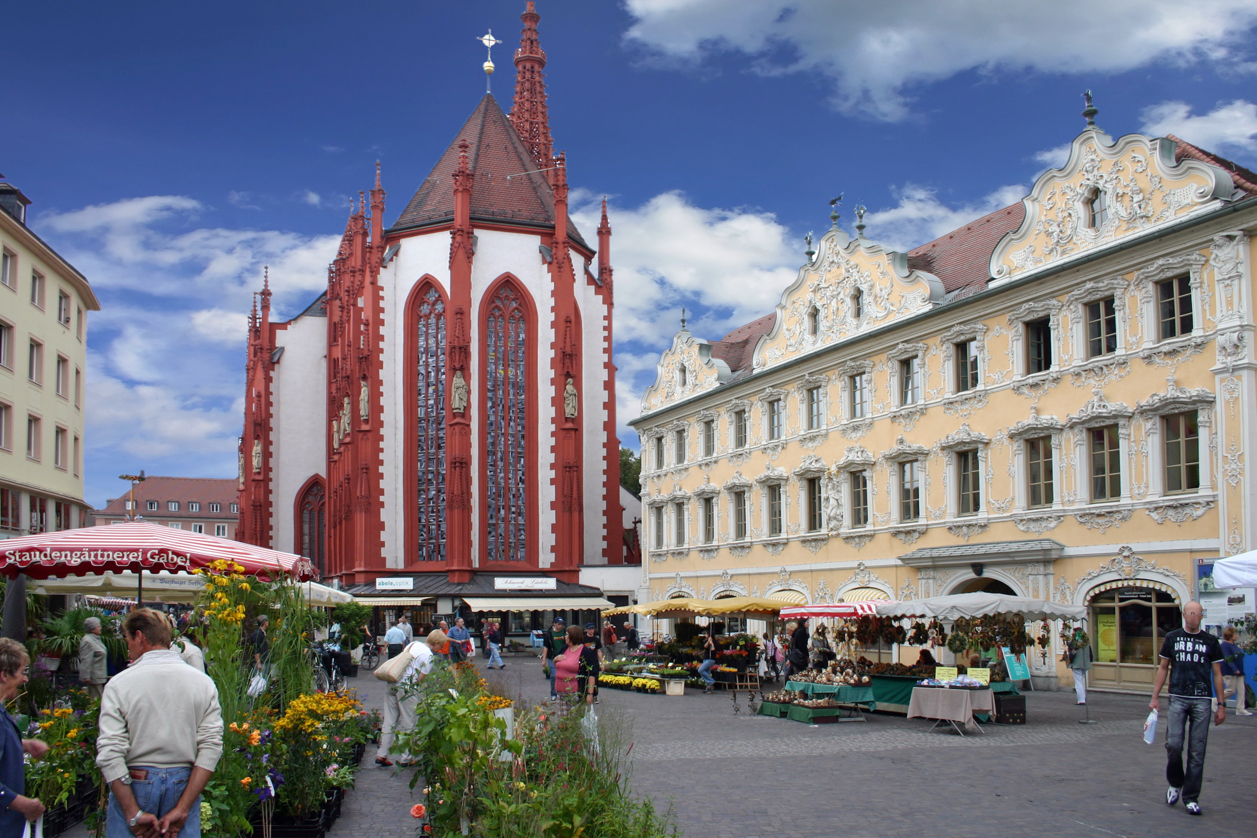 Würzburger Markt mit Marienkapelle und Falkenhaus